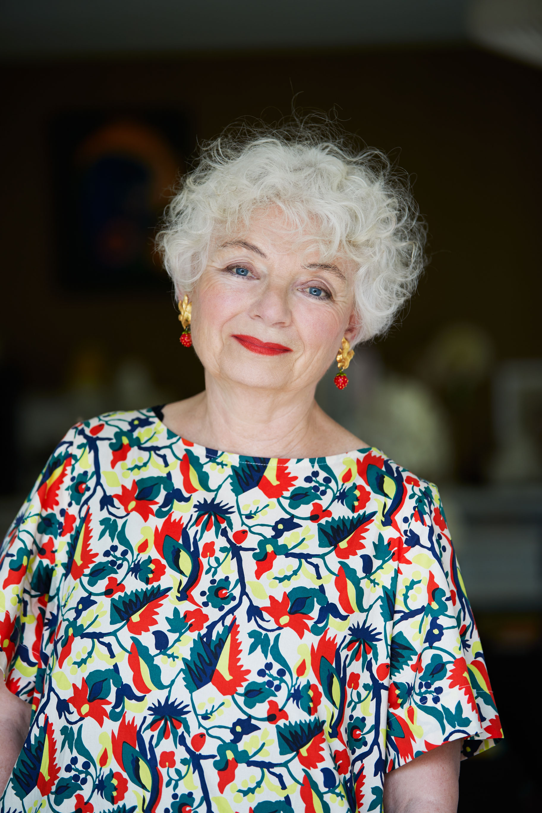 Alle Bildrecht liegen bei Frau Tatjana Hauptmann.